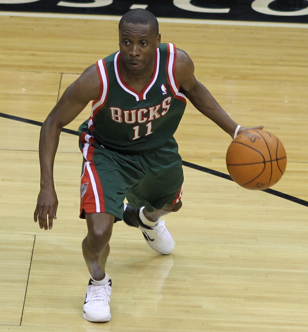 Wizards v/s Bucks 03/08/11